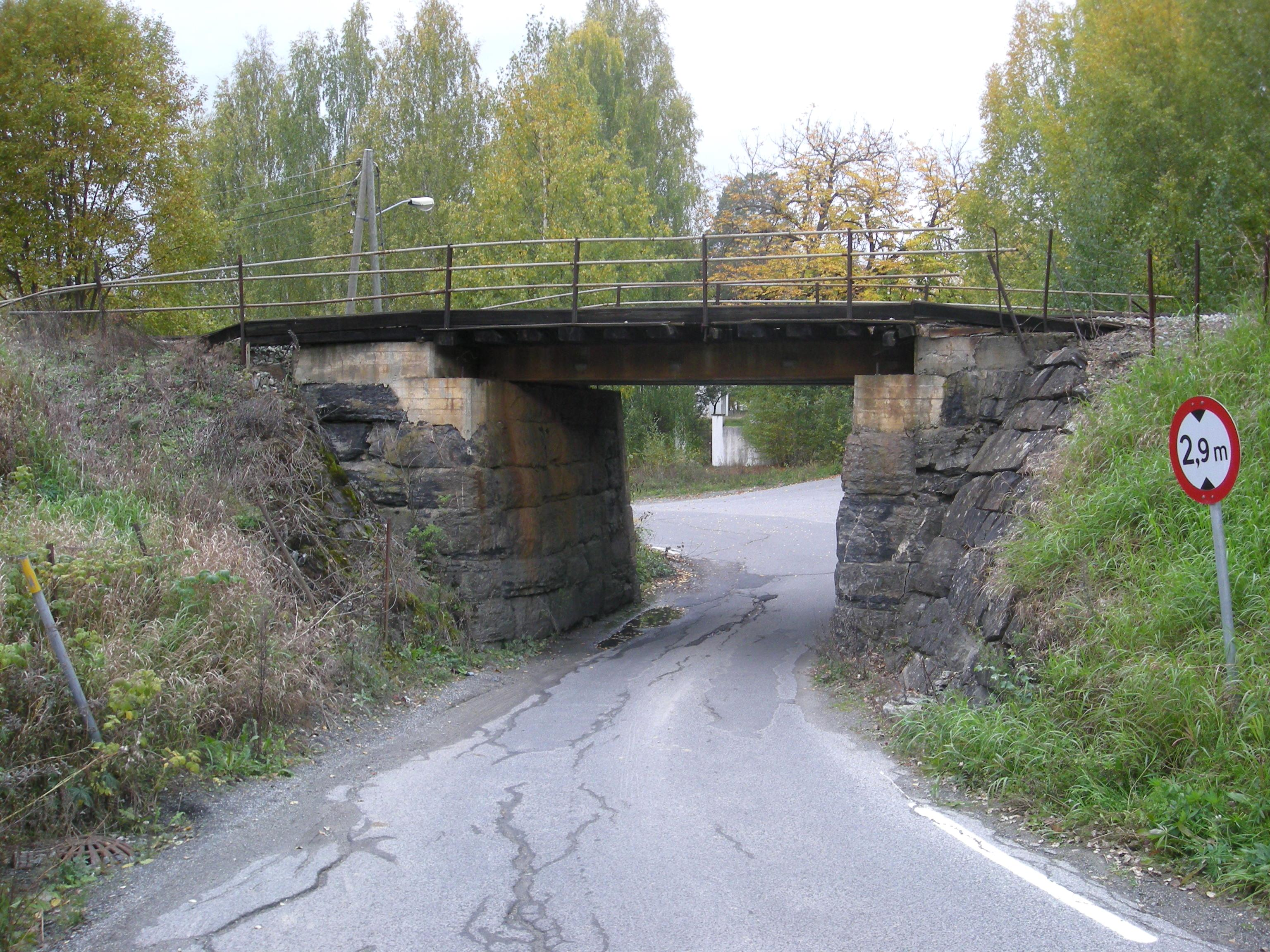 Viulvegen (fylkesvei 180, tidl. fylkesvei 165) går i undergang under Roa-Hønefosslinjen like ved Hval stasjon.